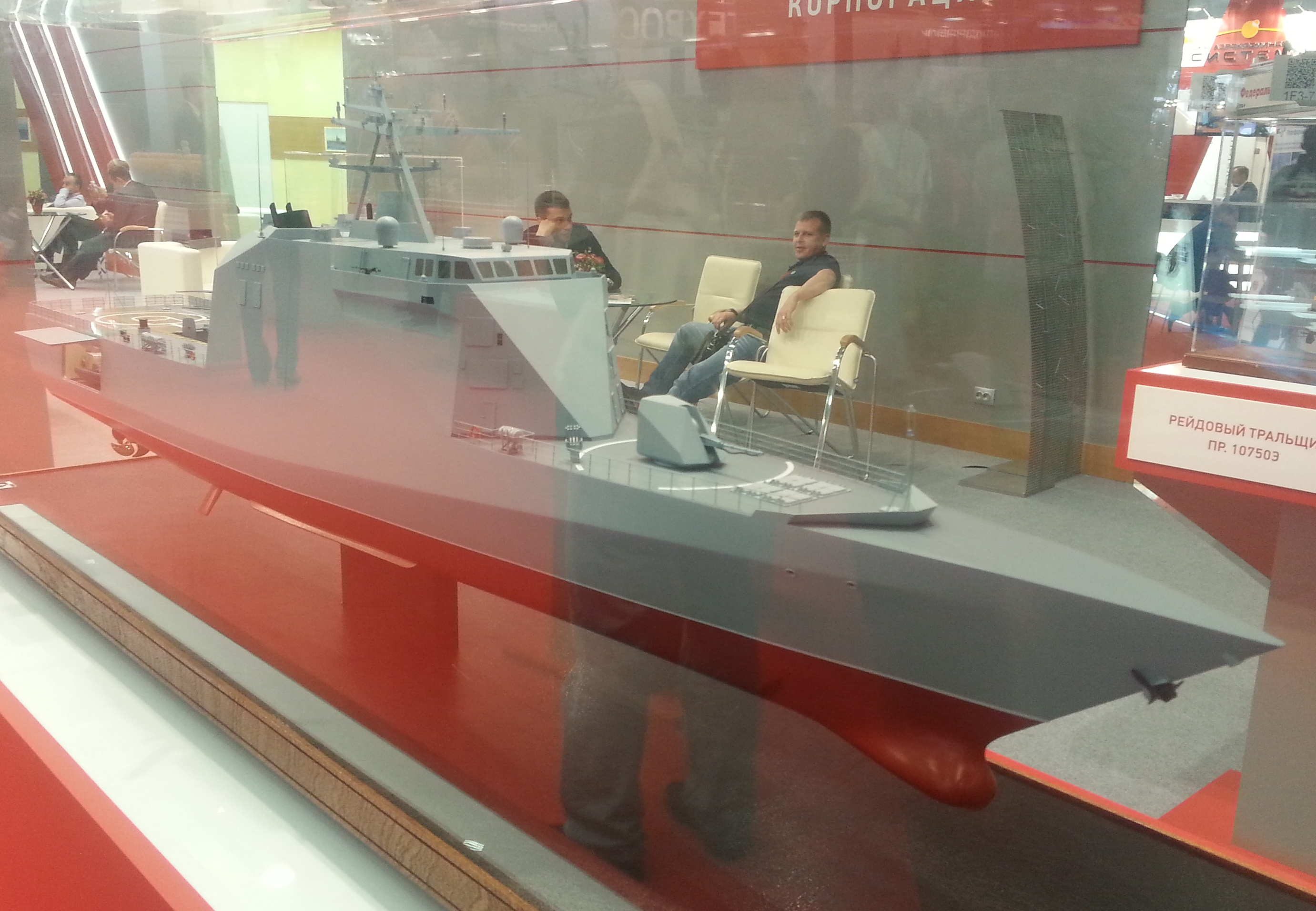 Модель корвета проекта 20386 на выставке «Армия 2016»